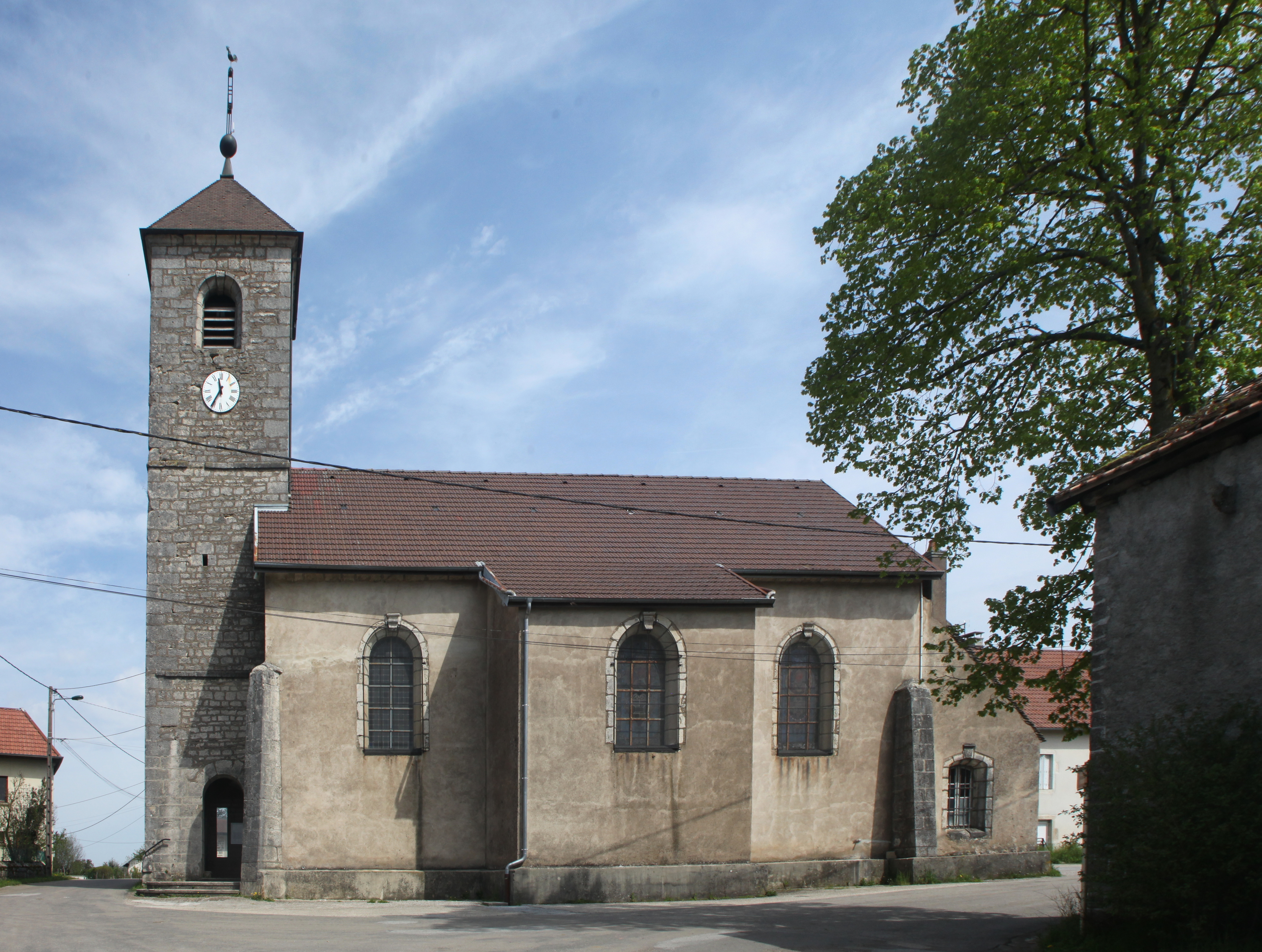 Église de Chassagne-Saint-Denis (Doubs).